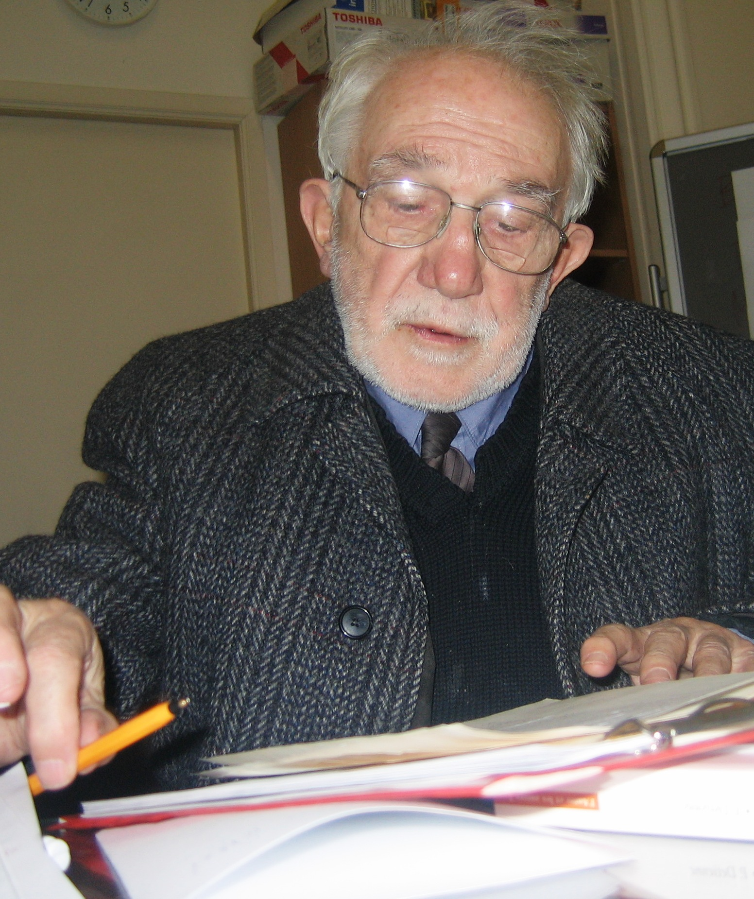 ফাদার দ্যতিয়েন। লেখার টেবিলে দেশ পত্রিকার জন্য রচিত প্রবন্ধ ঘষামাজা করছেন। ফটো তুলেছেনঃ ফয়জুল লতিফ চৌধুরী।